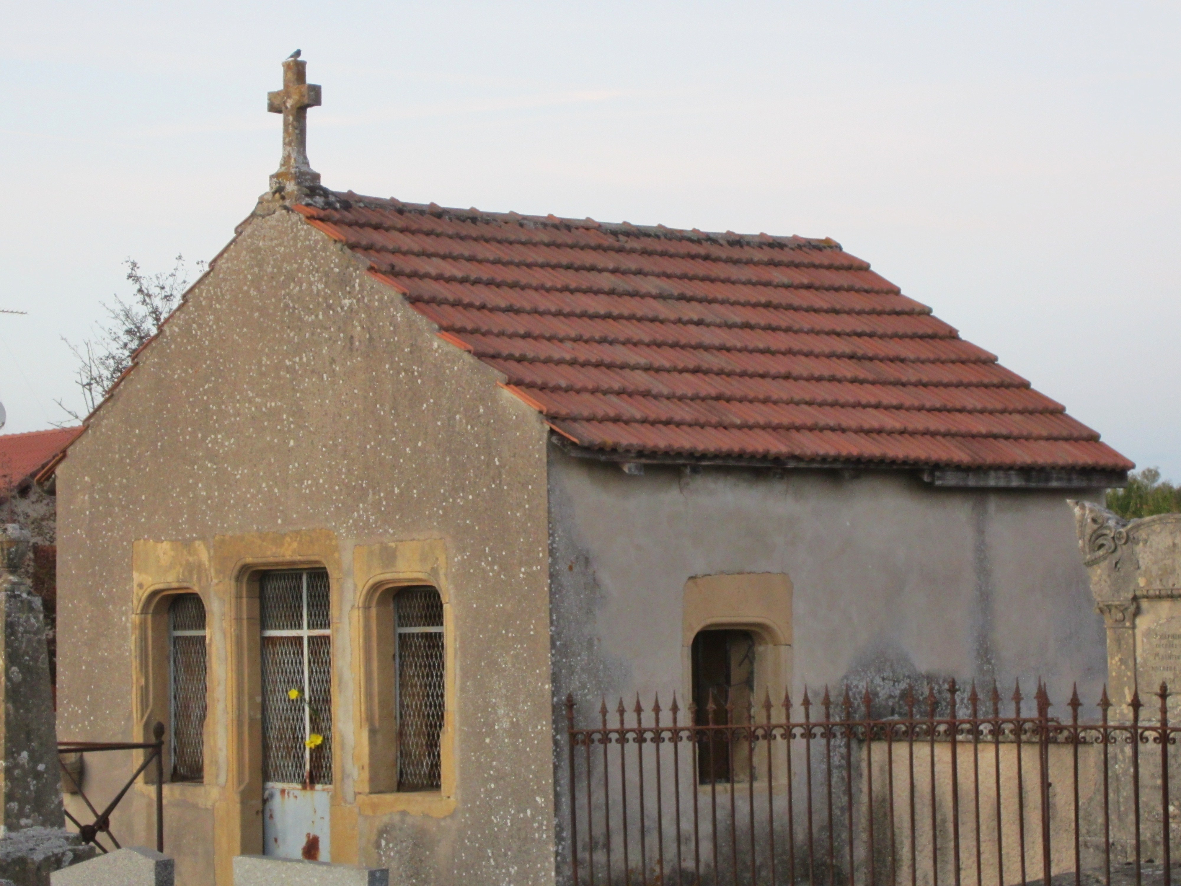 Description ossuaire Conflans Jarnisy ossuaire Conflans Jarnisy